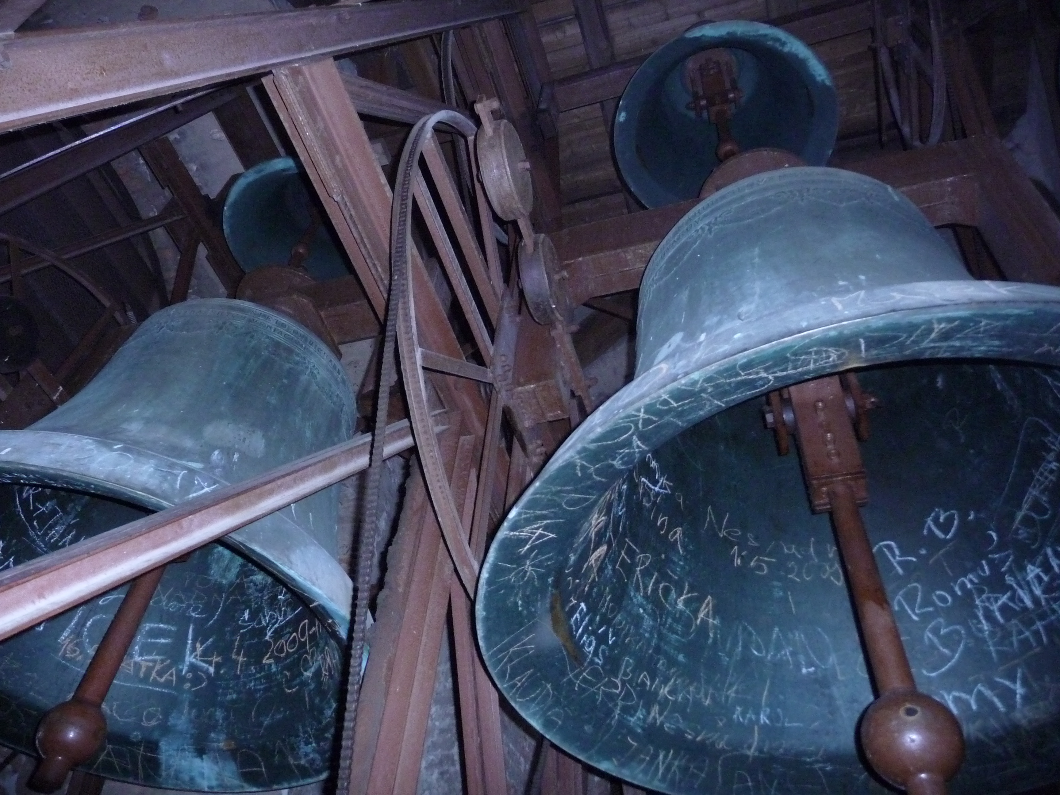 Vo veži sa nachádza 6 zvonov